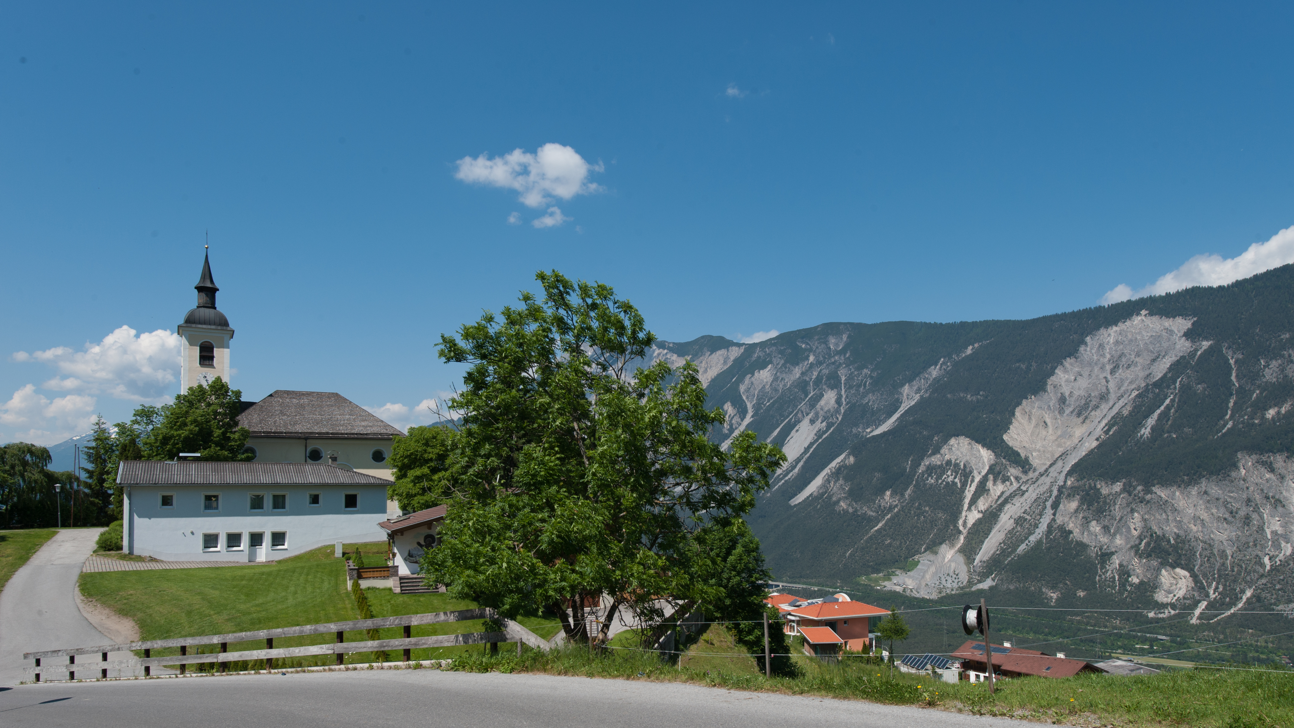 Wiki takes Nordtiroler Oberland: Kirche Mariae Heimsuchung in Haimingerberg